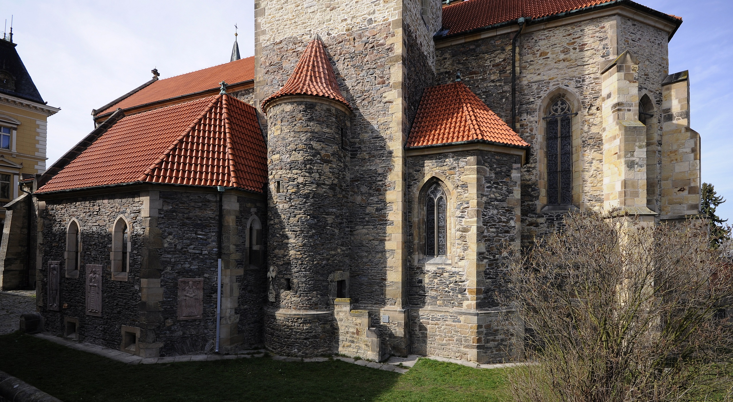 Kostel svatého Štěpána, Ptačí ryneček, Mírové náměstí, Kouřim.